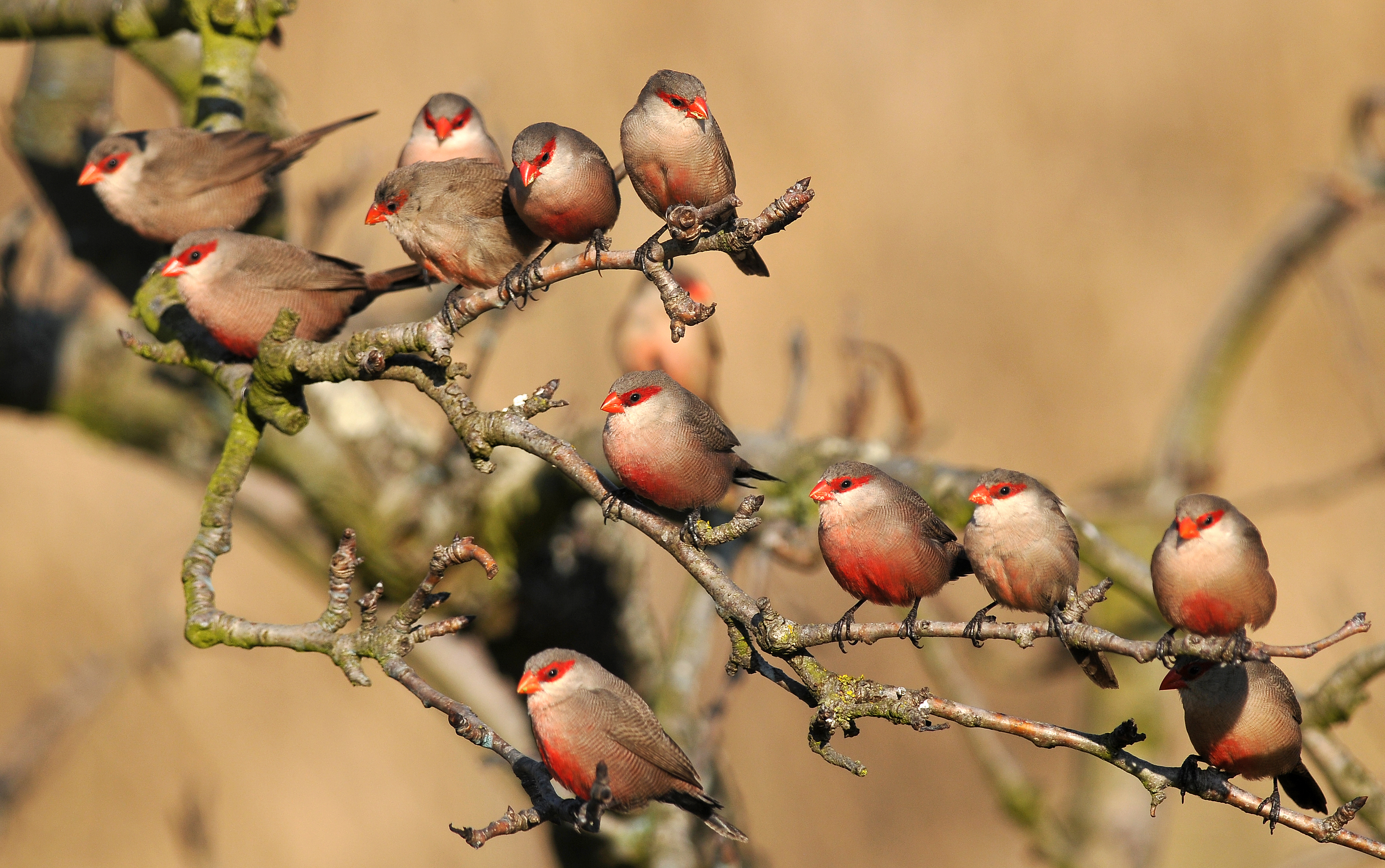 Foto tirada nas Águas Santas - Caldas da Rainha